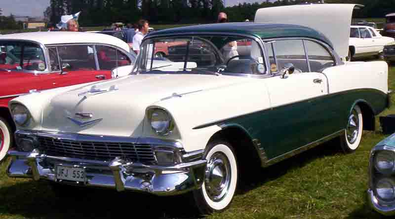 1956 Chevrolet Two-Ten Series 2100B, Model 2154 2-door Hardtop